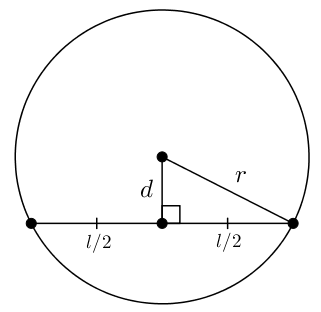 Одно из свойств хорды